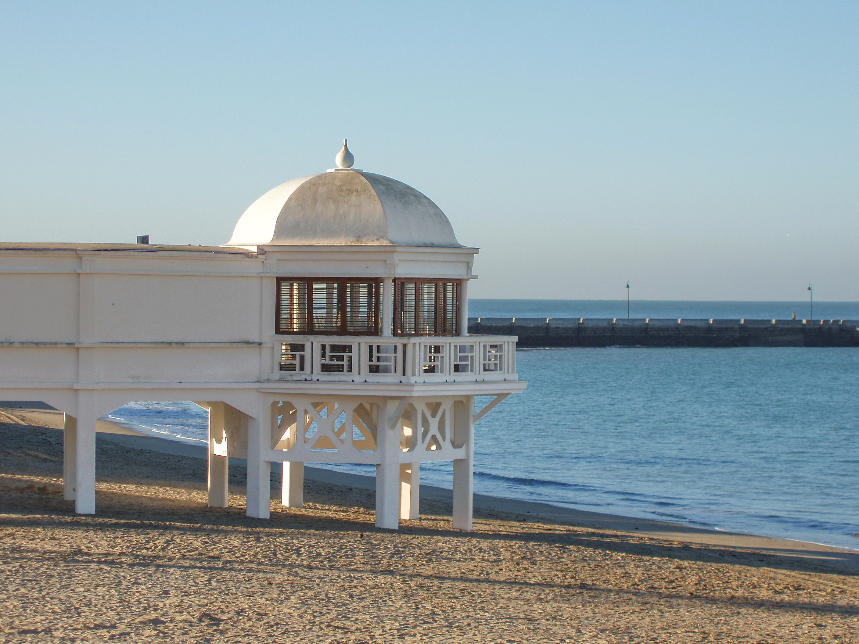 Balneario de Nuestra Señora de la Palma y del Real en La Caleta en Cádiz, España.